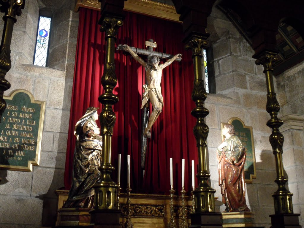 La capilla de Santo Cristo se encuentra en la entrada a mano izquierda. La talla de Cristo crucificado ya muerto, es una obra barroca de autor anónimo del siglo XVII. Las tallas de la Dolorosa y de San Juan que completan el conjunto son muy posteriores.